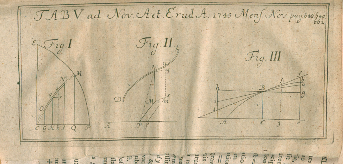 Illustration